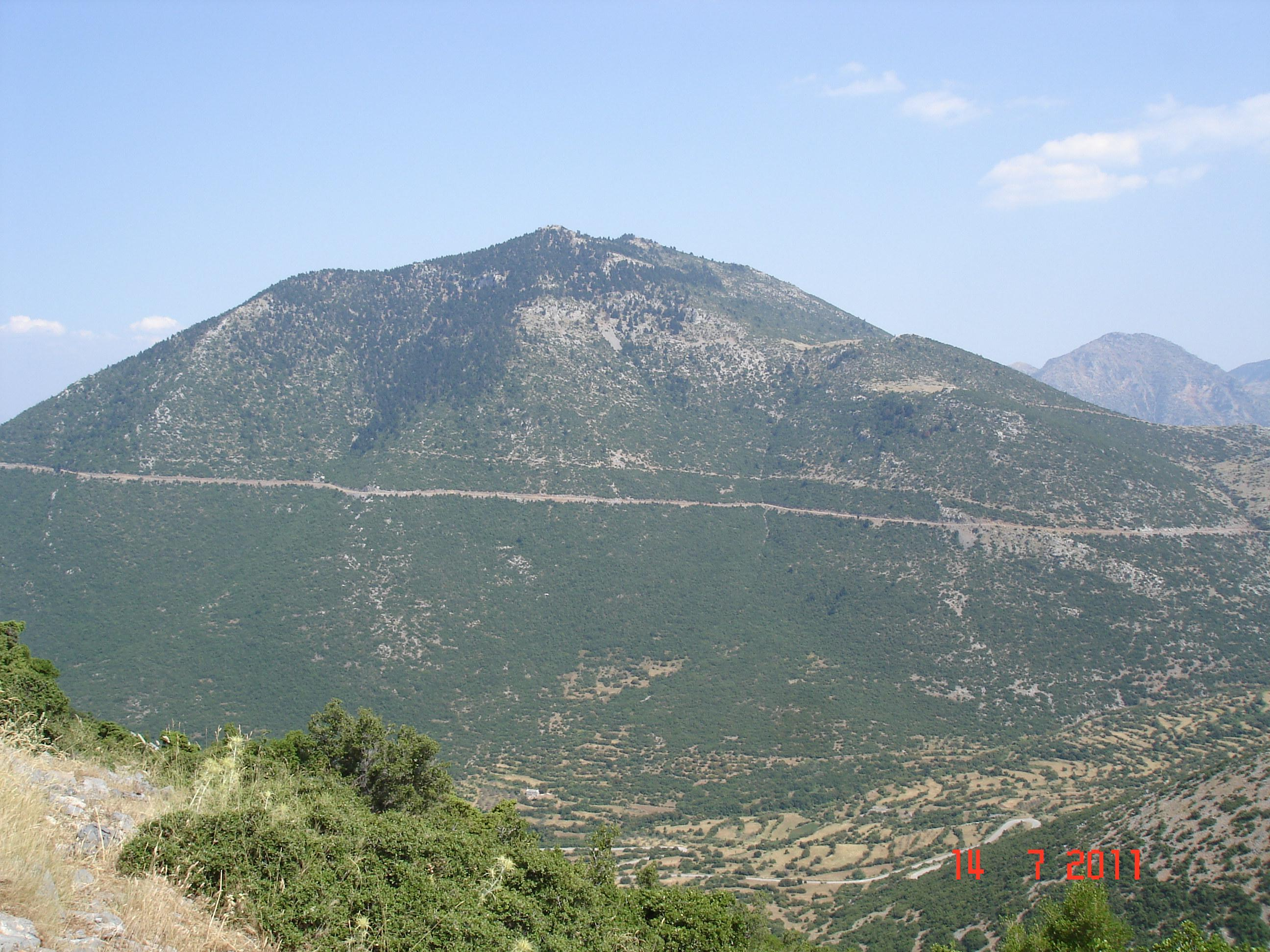 Το Μελιδόνι ή Ξεροβούνι με 1289 μ. ύψος, πάνω από το Κεφαλόβρυσο